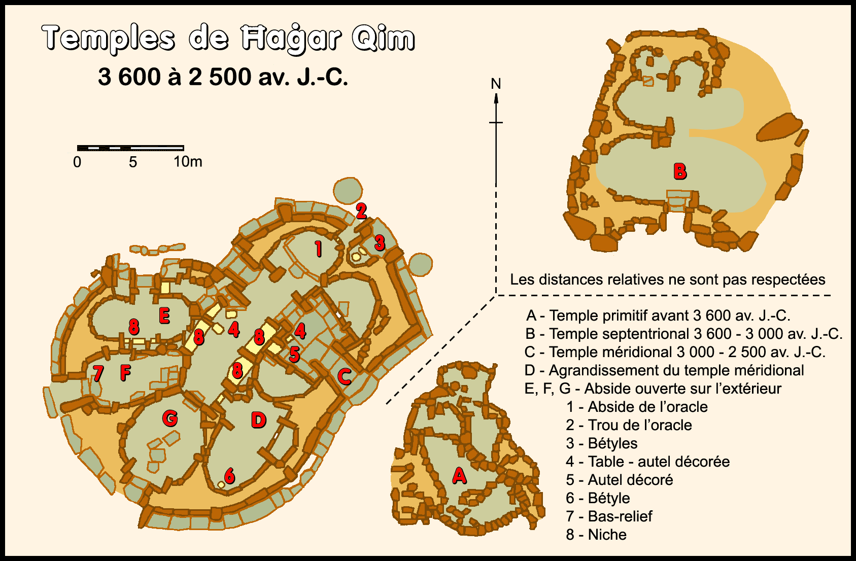 plan du site des temples de Hagar Qim